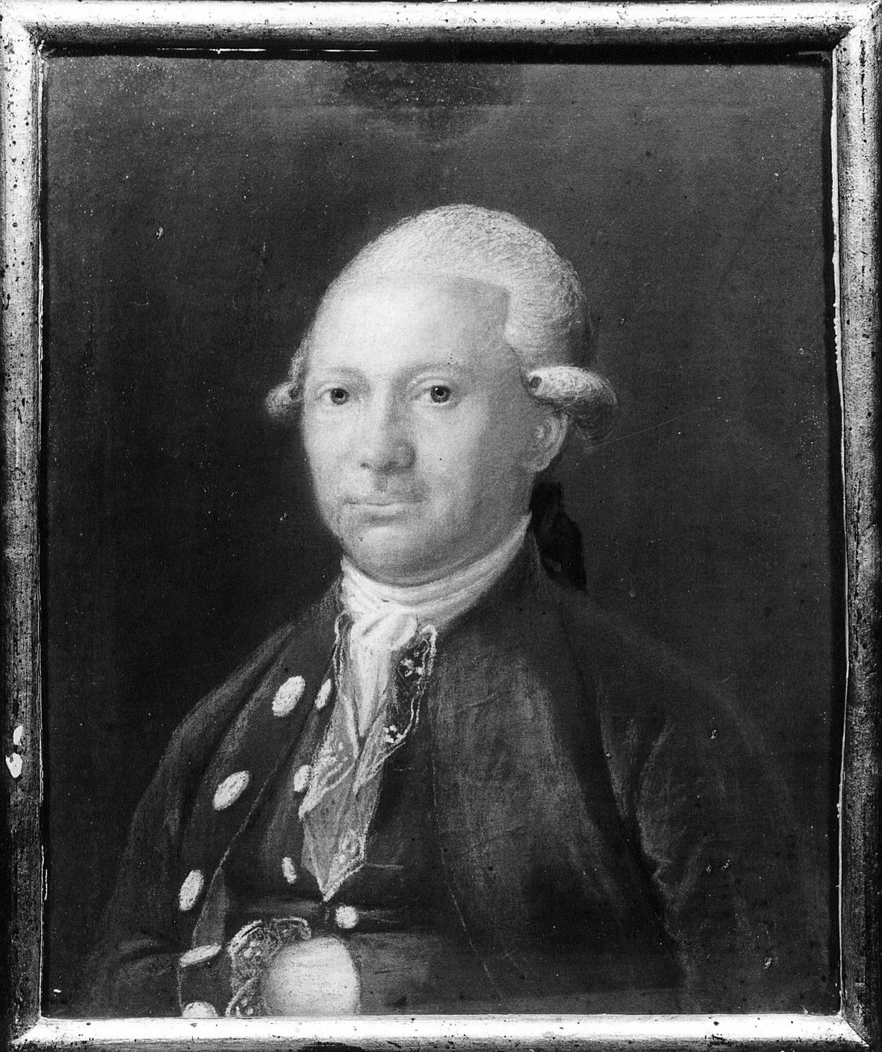 Kammerjunker Jacob Løvenskiold